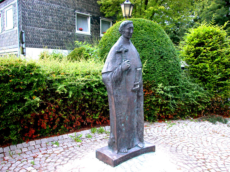 Teilstrecke 1a Wuppertal Beyenburg - Remscheid-Lennep, 0 km